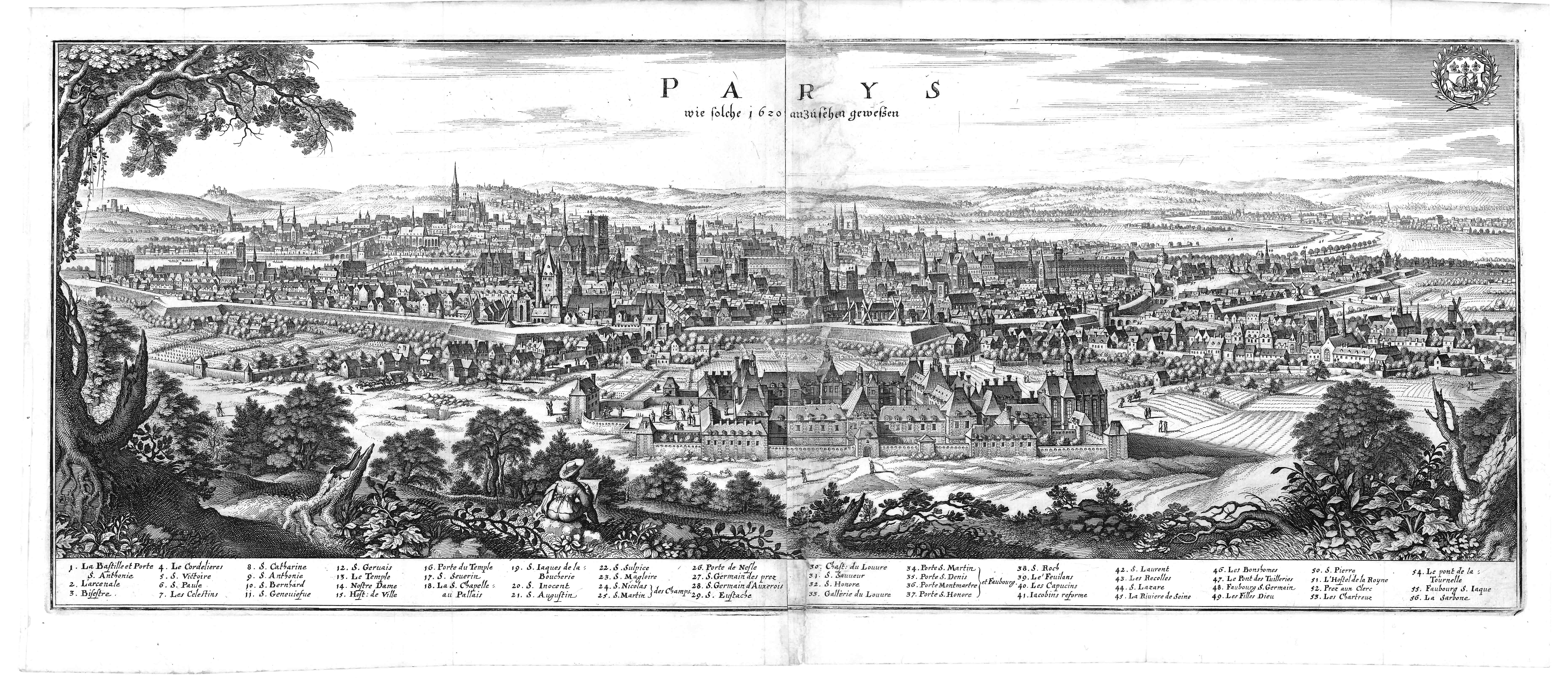 MERIAN, M.: Parys wie solche 1620 anzusehen gewesen. (Frankfurt am Main, 1655-1661)